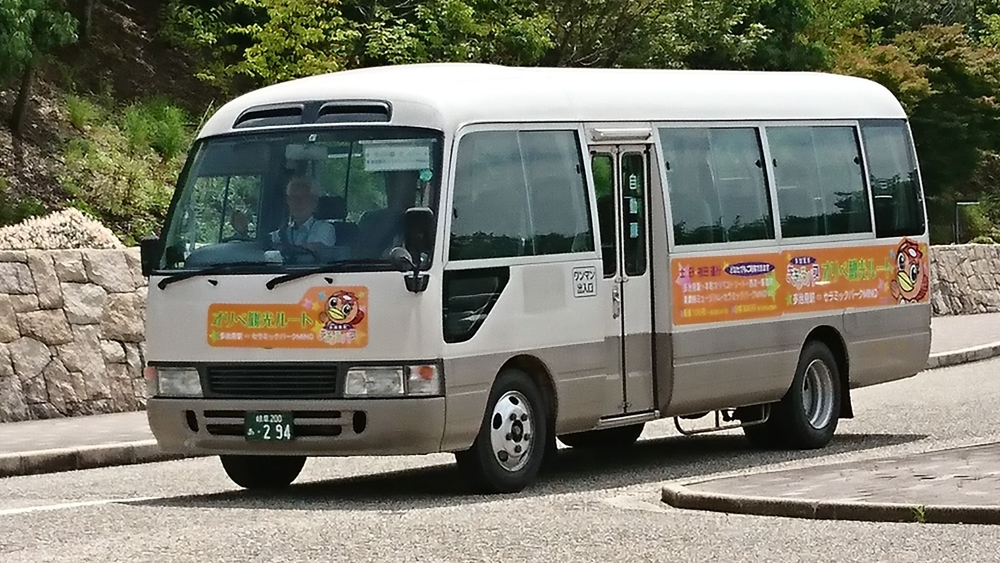 ききょうバスオリベ観光ルート 東鉄タクシー